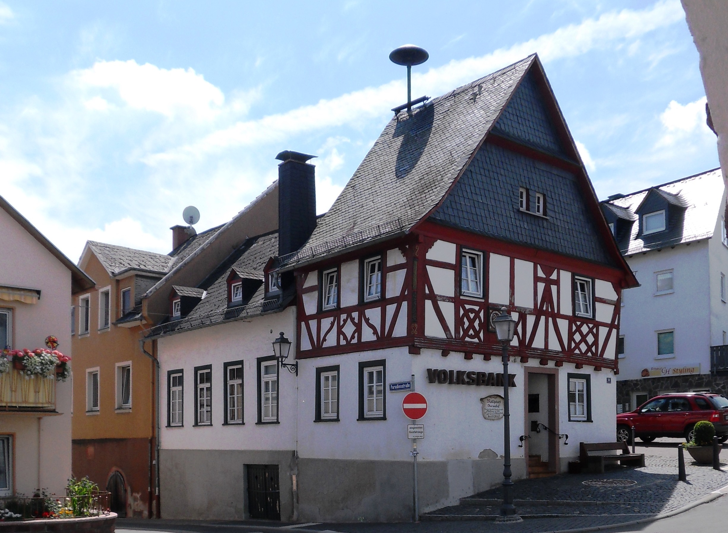 Blick von Norden auf das Rathaus von Oberwalluf in der Marktstraße